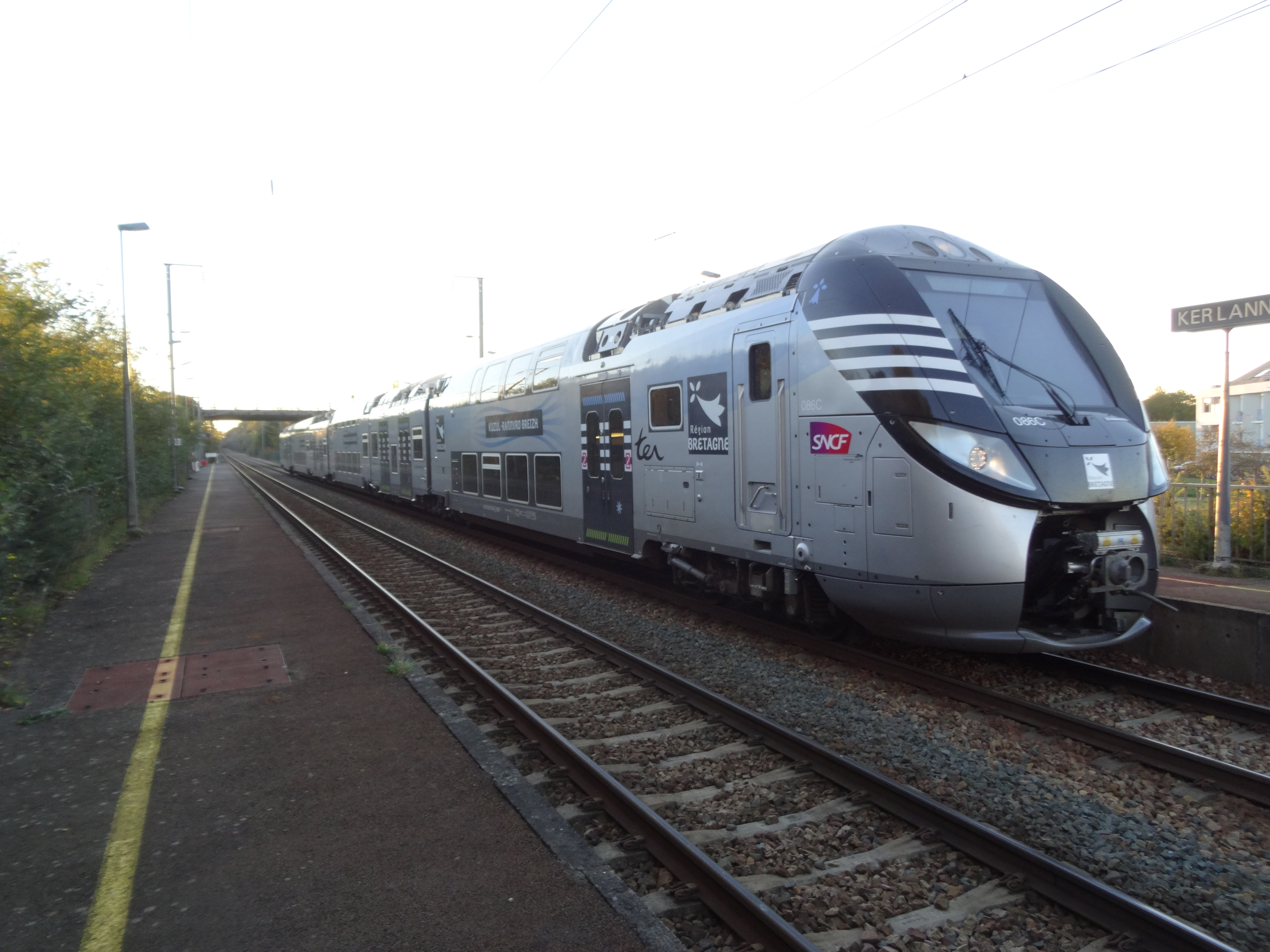 Un train Regio2N en gare de Ker Lann